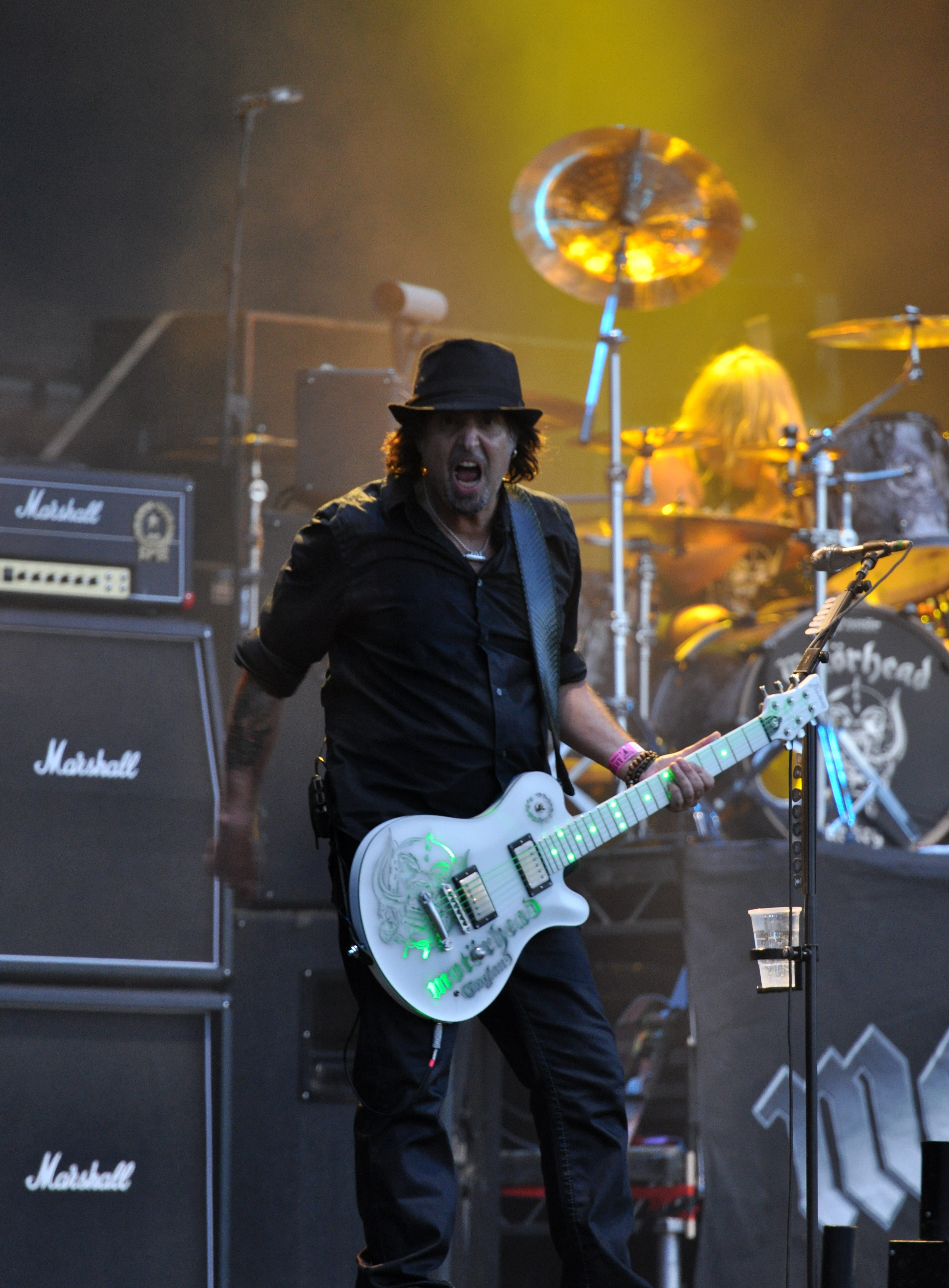 Motörhead at Wacken Open Air 2013